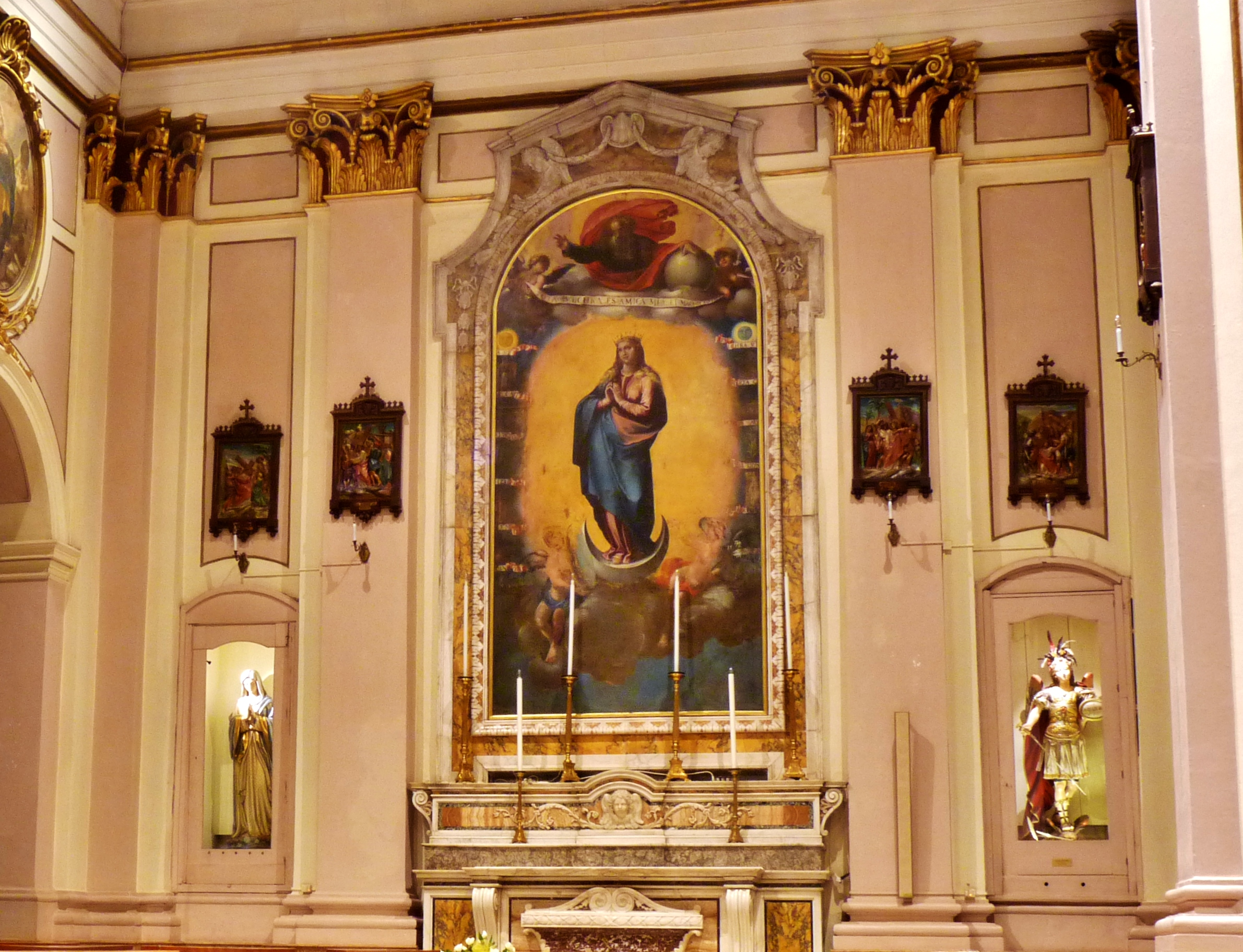 Altare dedicato all'Immacolata Concezione nella Collegiata Santissima Maria Assunta di Ceglie Messapica (BR), navata destra